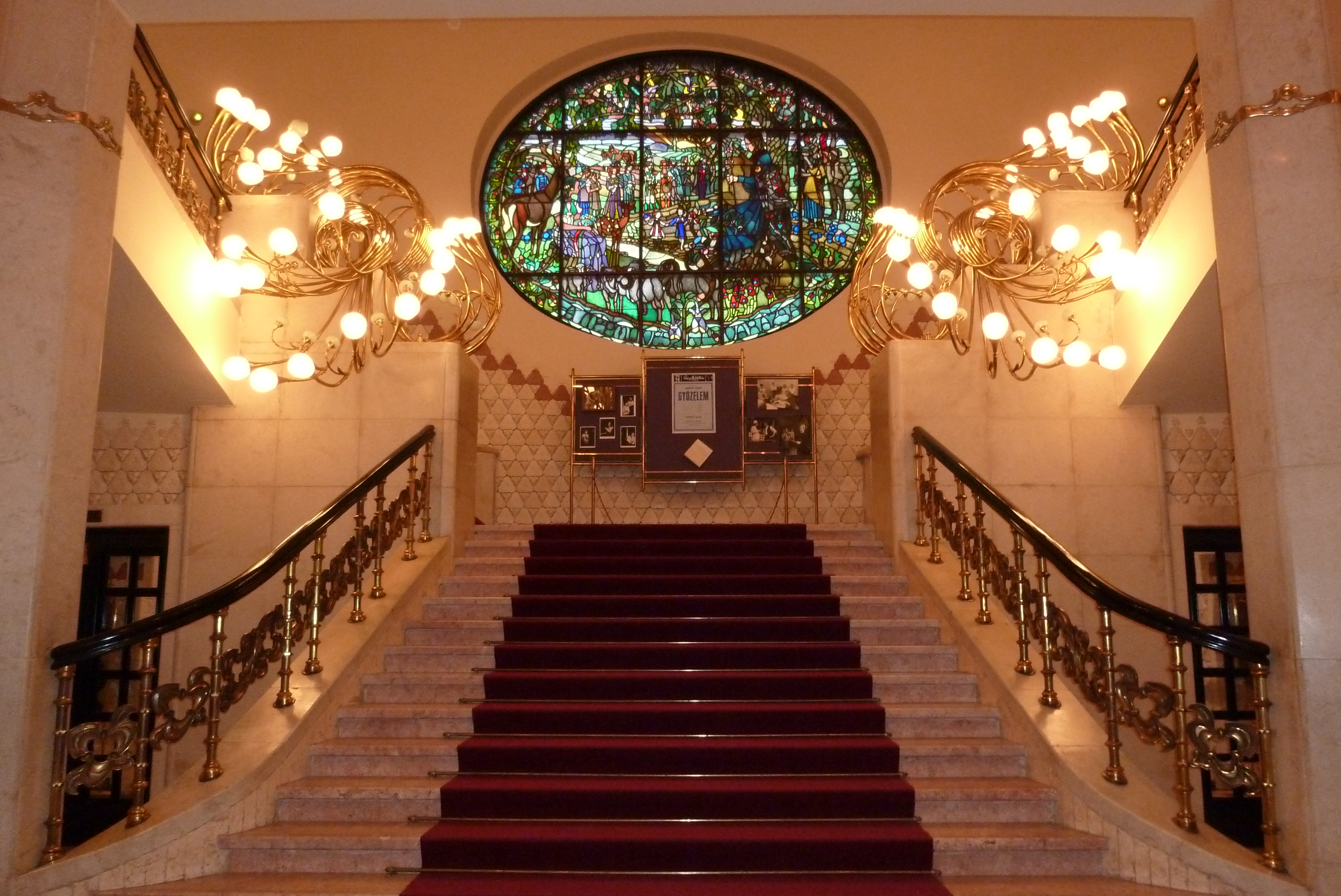 A veszprémi Petőfi Színház díszlépcsője